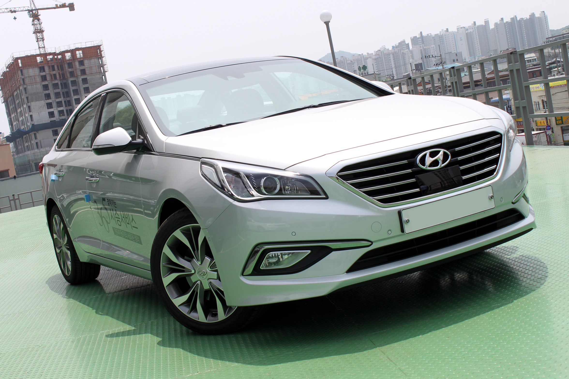 현대 쏘나타(LF) 정측면